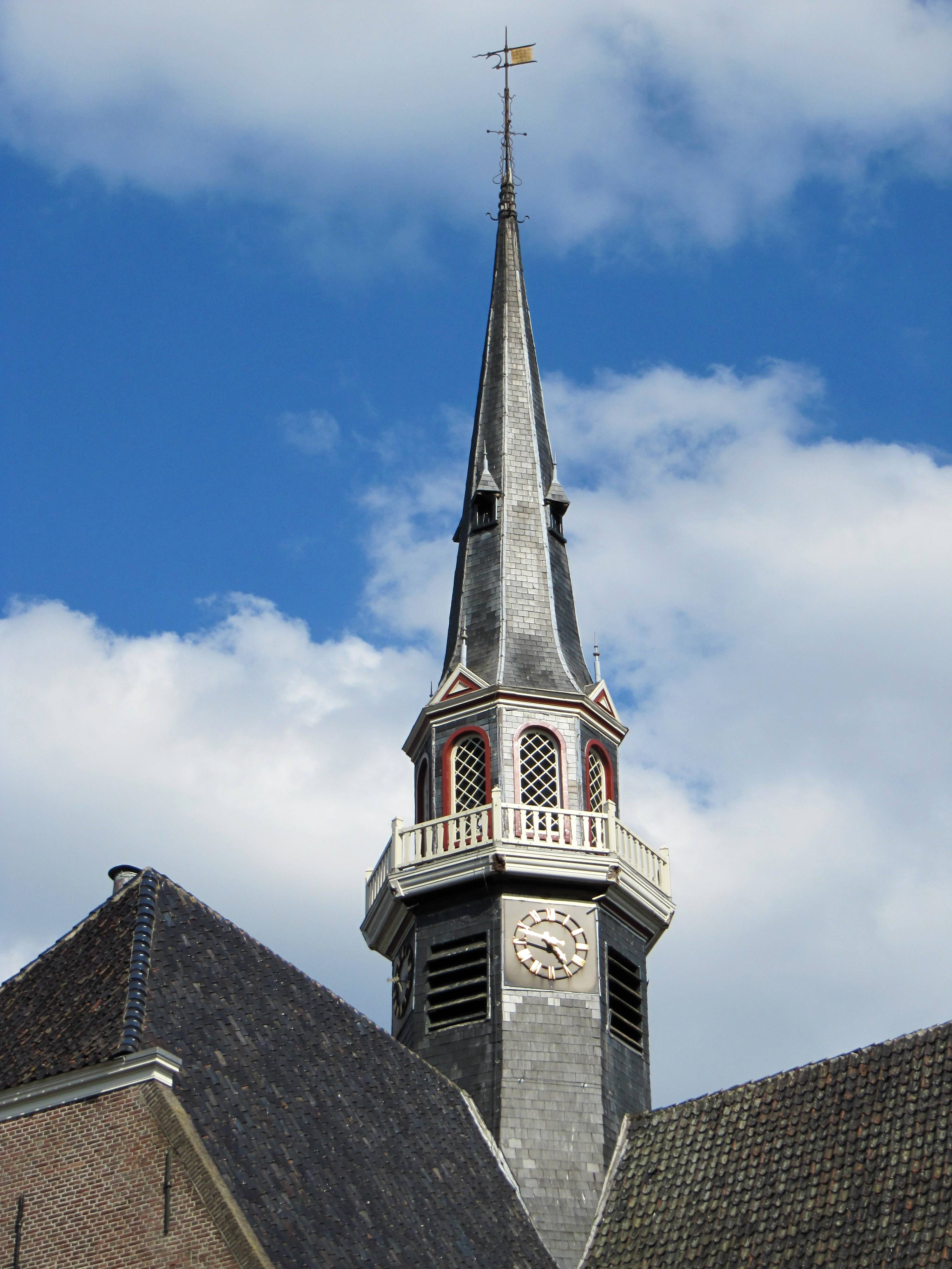 Toren van de Ned.Herv.Kerk. Klokkenstoel met gelui van twee klokken van Wilhelm Wegewaert, 1588